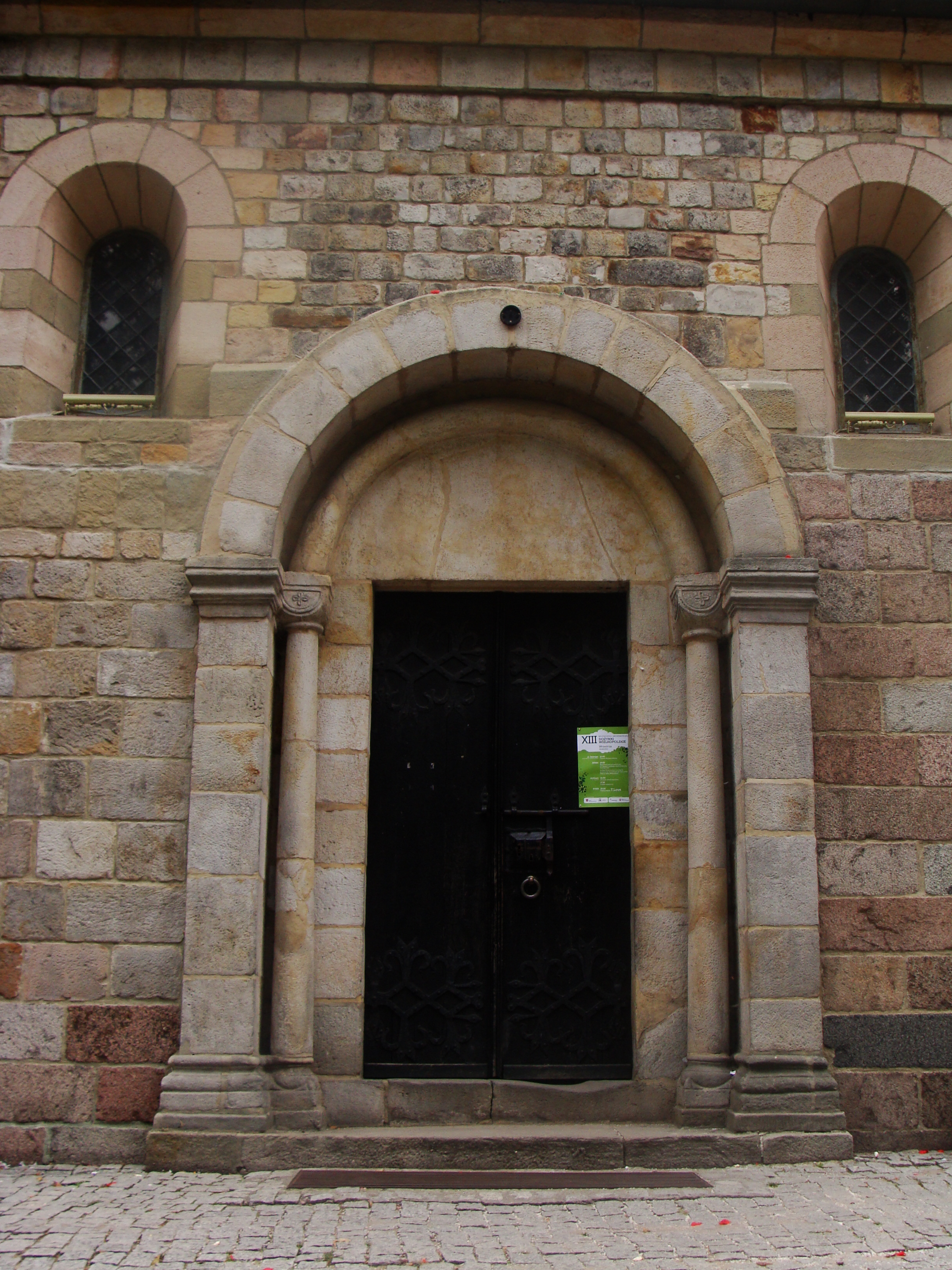 Kruszwica, kolegiata p.w. śś. Piotra i Pawła, 1120-1130